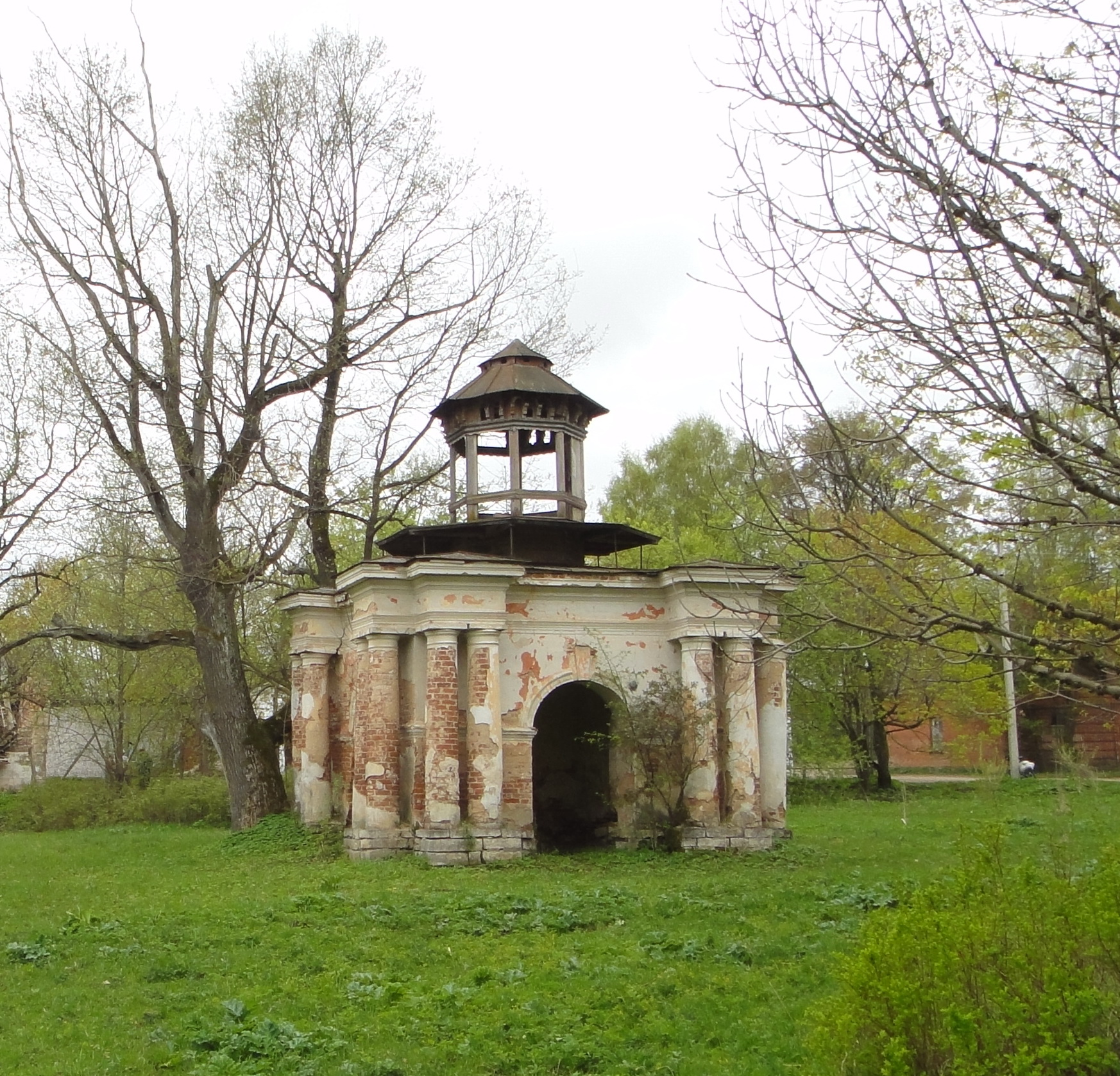 беседка, голубятня, колодец (Псковская область, Порхов, село Волышево)